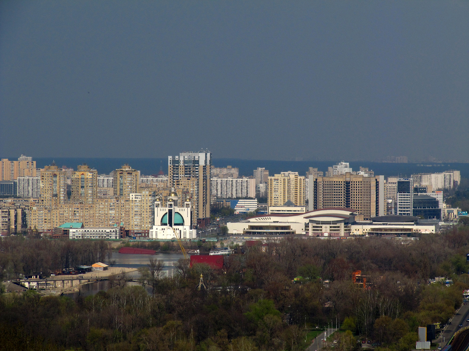 Вид від монументу у парку Слави на Лівий берег, та Долобецький та Венеціанський острови